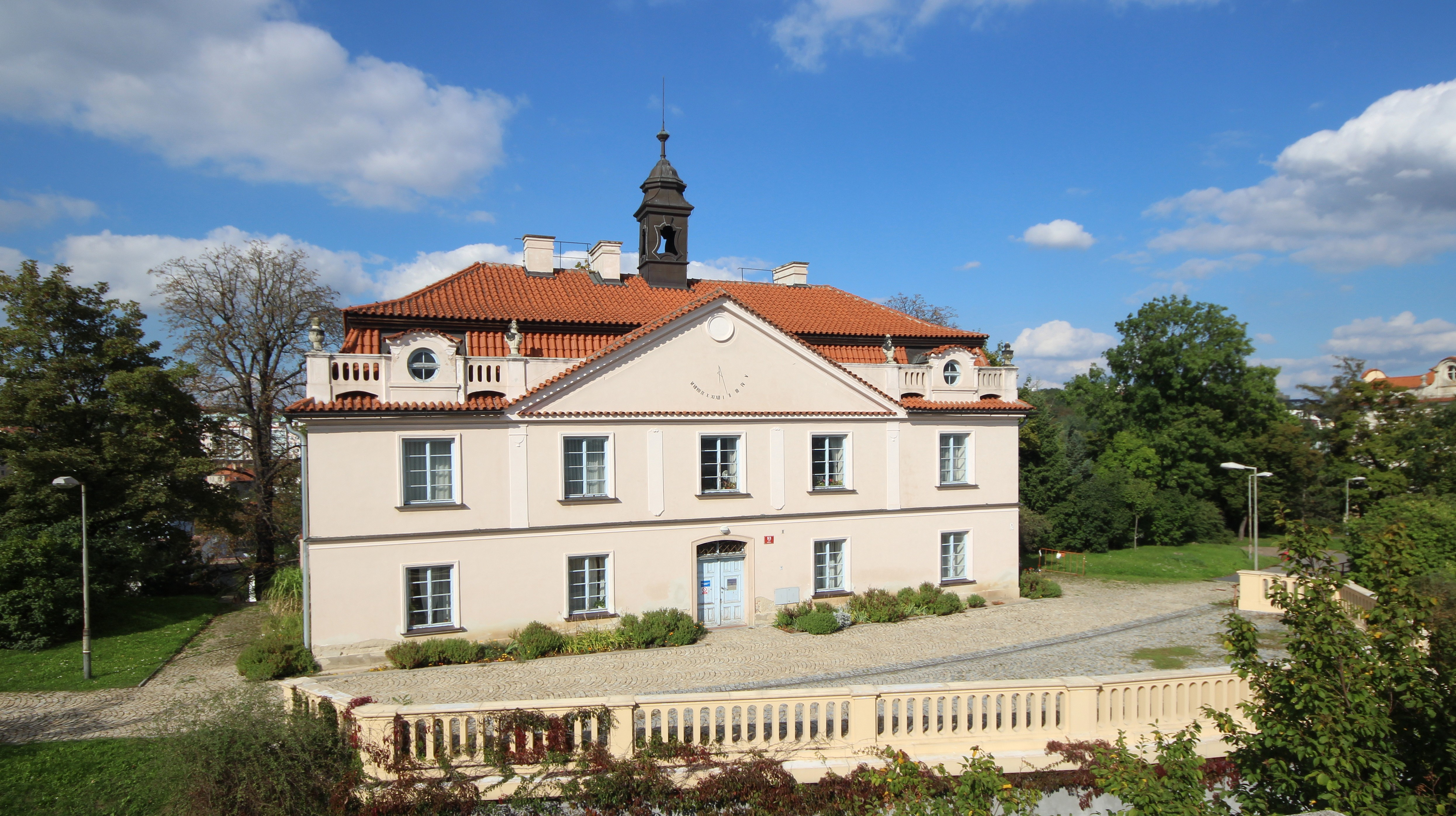 Usedlost Rokoska v areálu neocnice Na Bulovce (pohled od jihu). This photograph was taken with a DSLR from WMCZ's Camera grant.